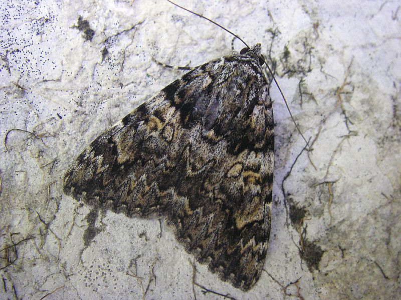 Catocala promissa France - Rhône-Alpes